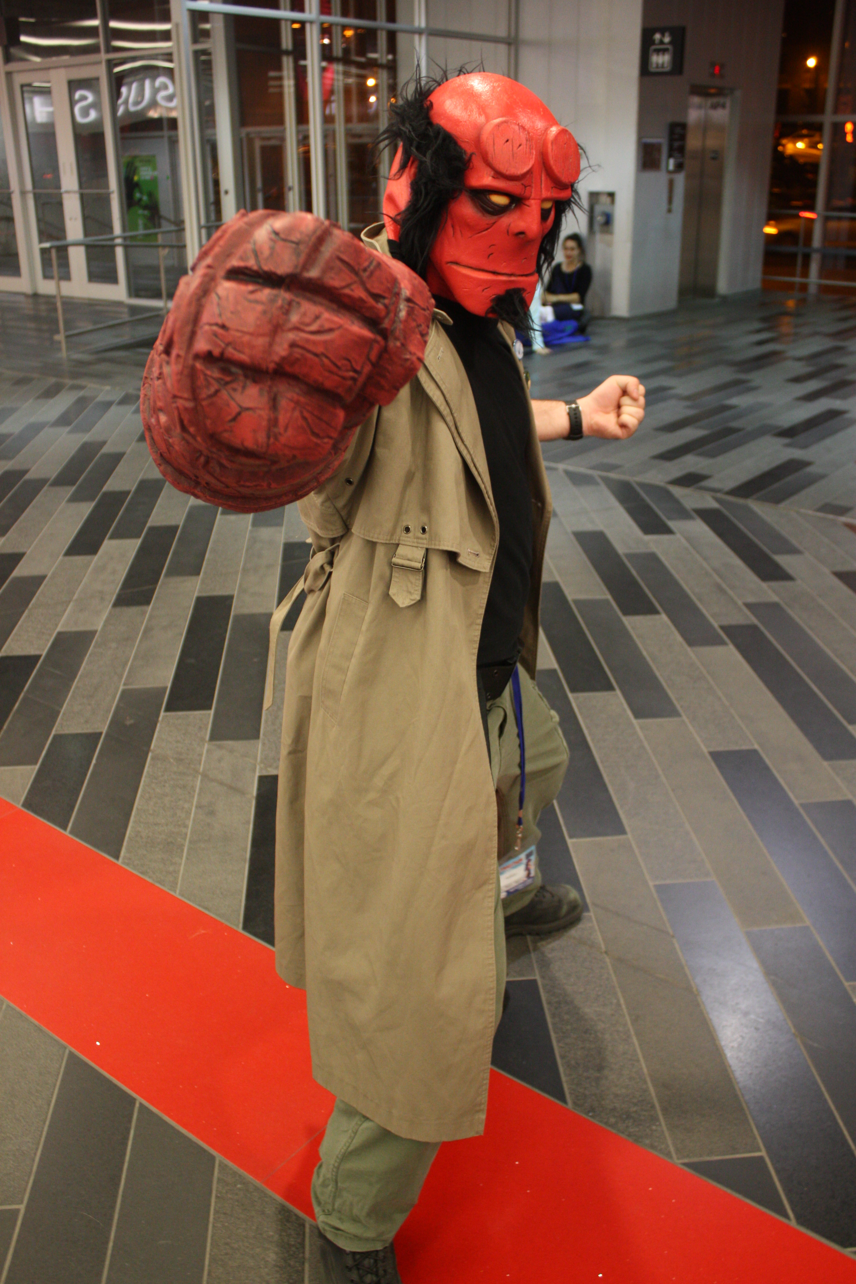 Otakuthon 2014: Hellboy